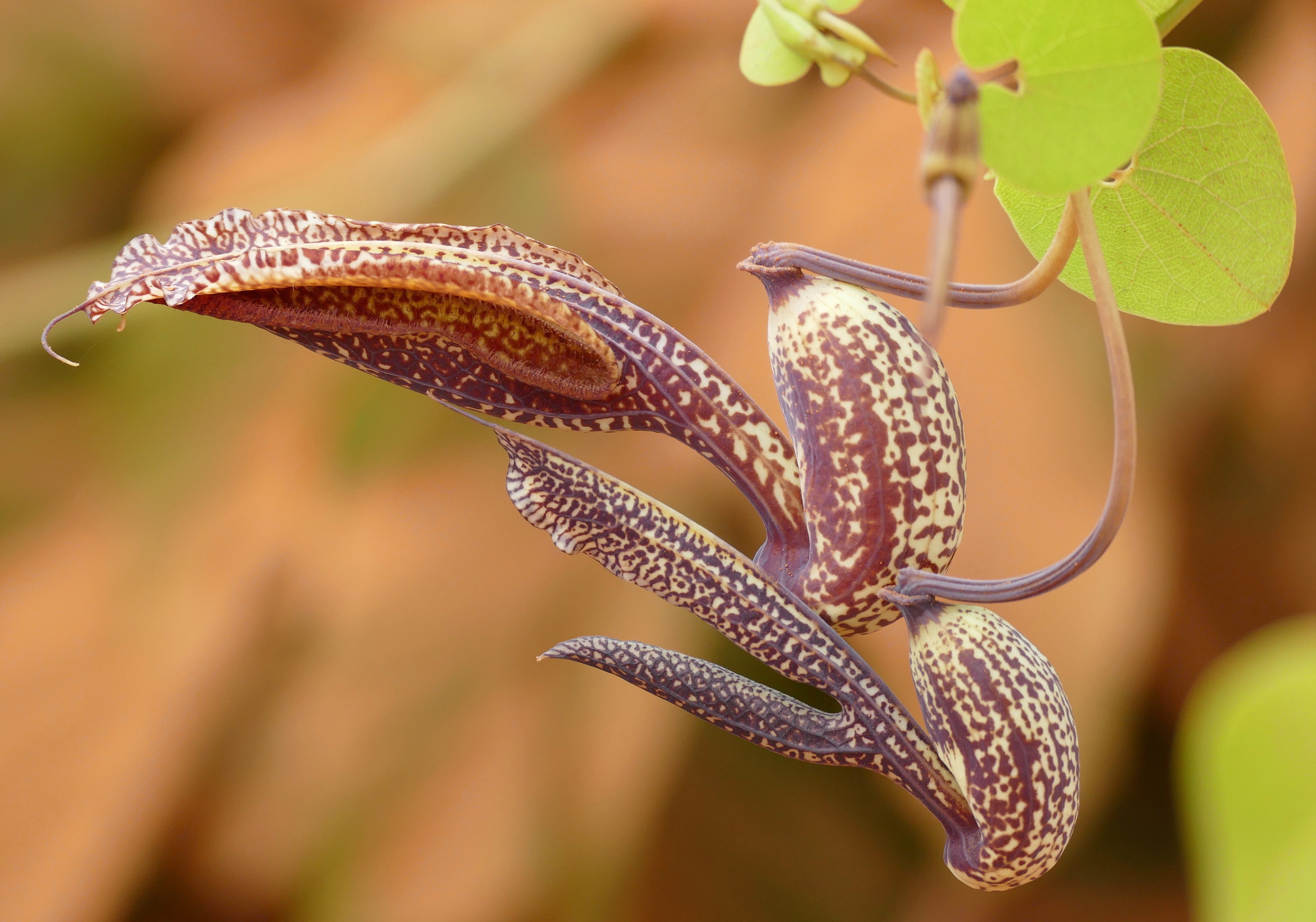 Transpantaneira, Poconé, Mato Grosso, BRAZIL